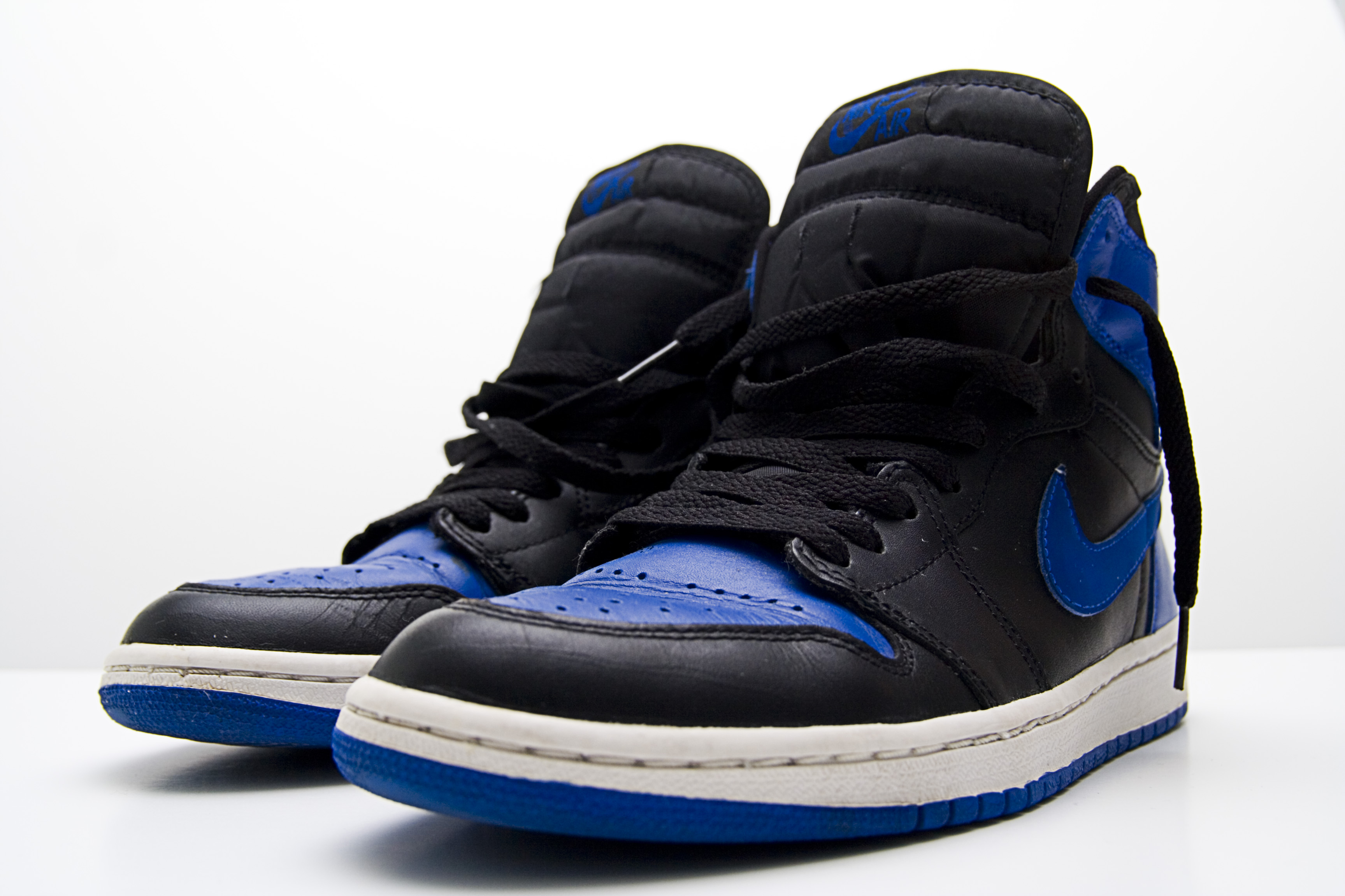 Nike Air Jordan I Retro